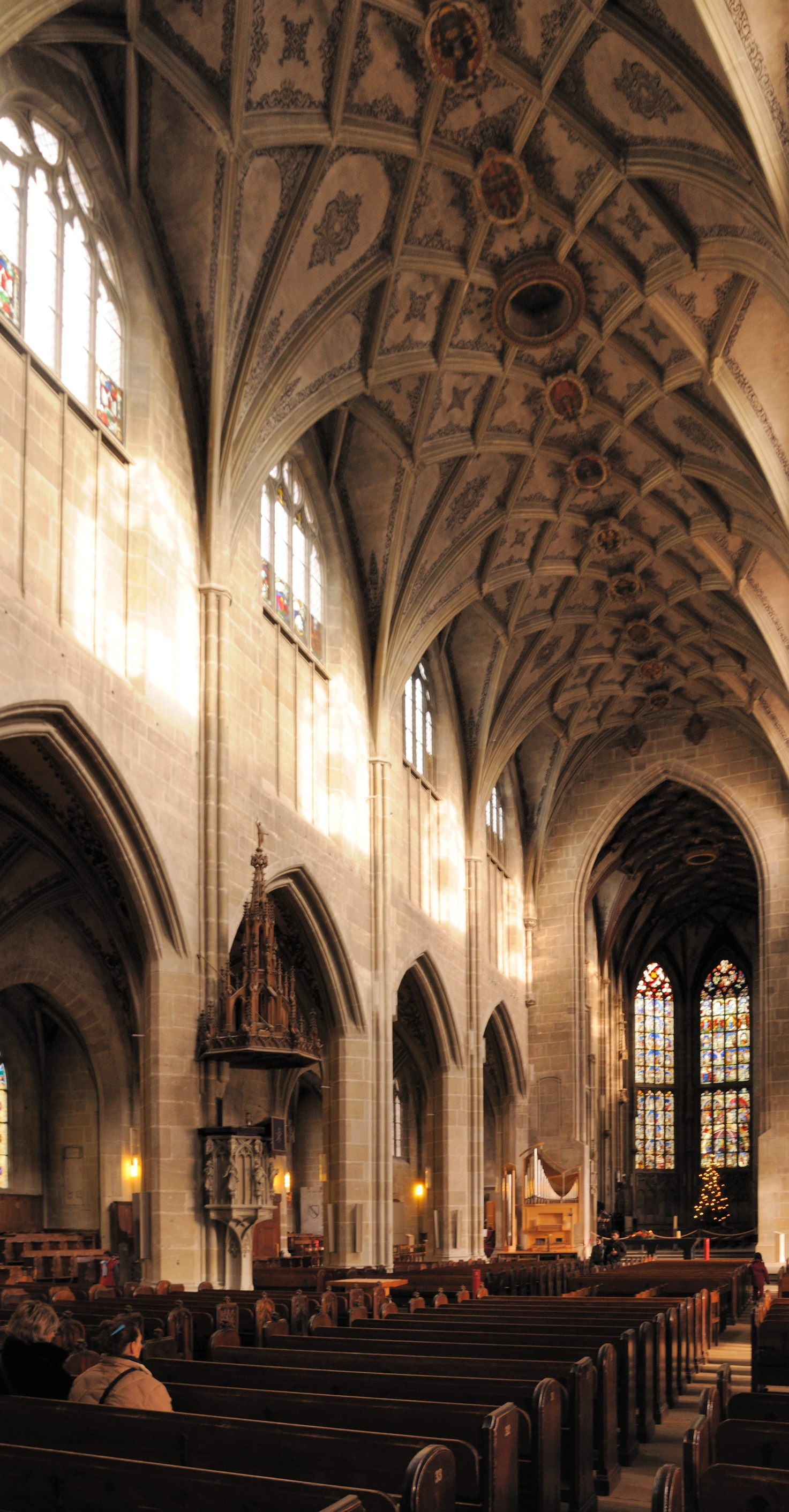 Berner Münster: Mittelschiff in der Schrägansicht Richtung Chor